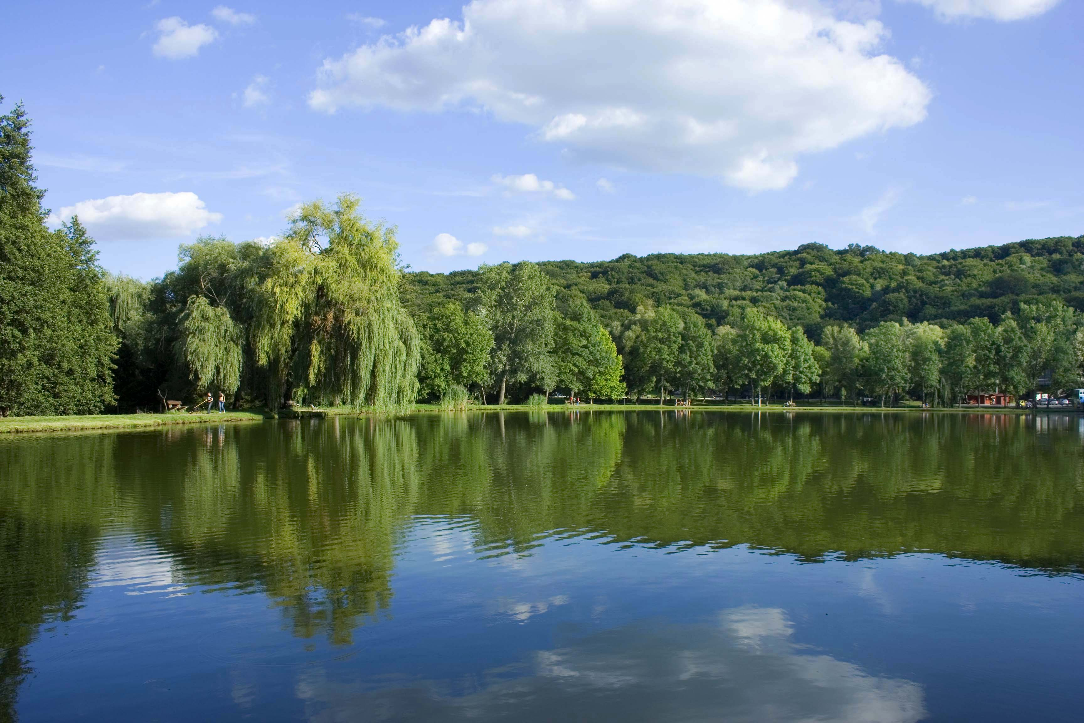 Abaliget, Horgász-tó